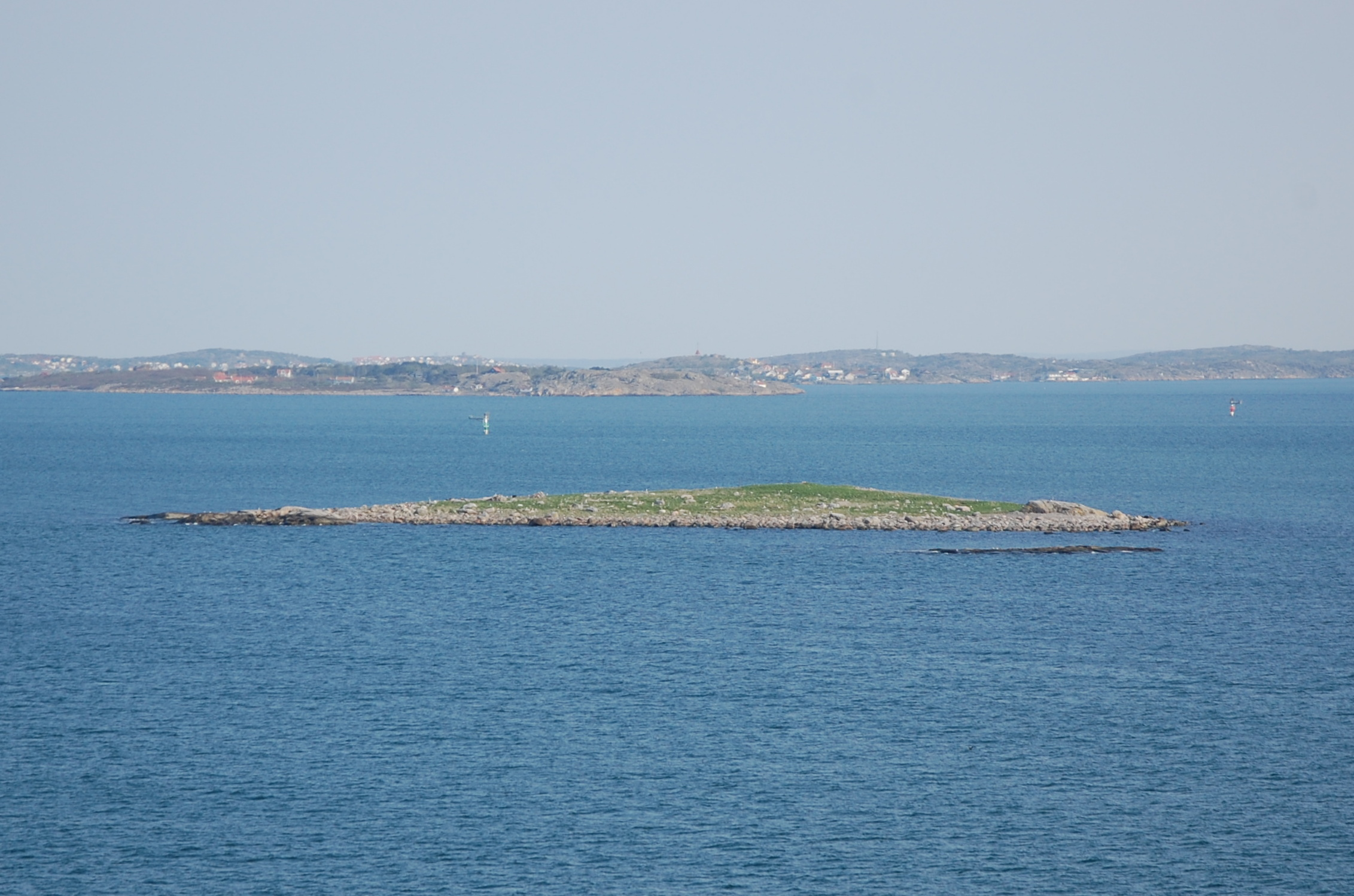 Insel im Schärengarten vor Göteborg